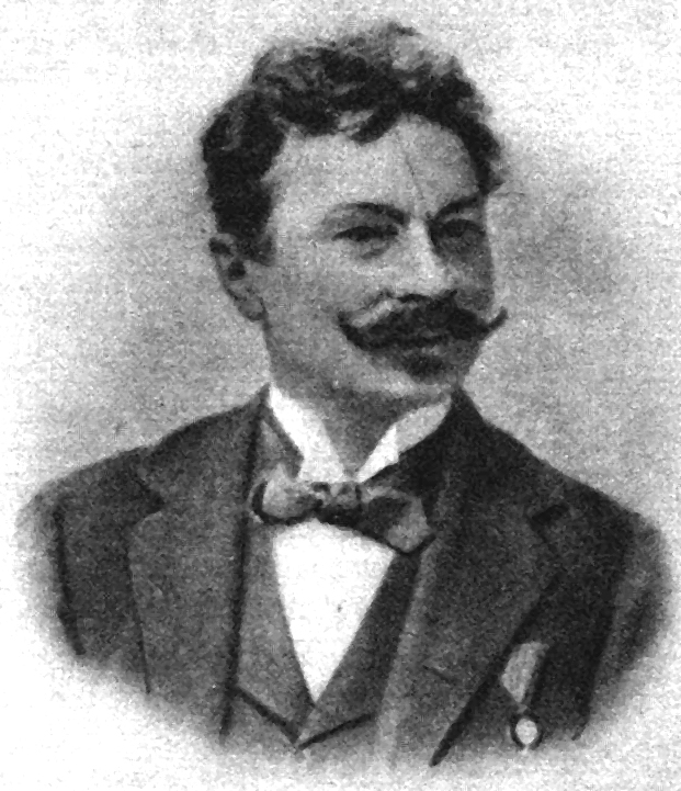 Alexander Nehr (30. Januar 1855 in Baja, Komitat Bács-Kiskun – 29. Februar 1928 in Wien) war ein ungarischstämmiger österreichischer Kunstschlosser, dessen bekanntestes Werk der Wiener Rathausmann ist.